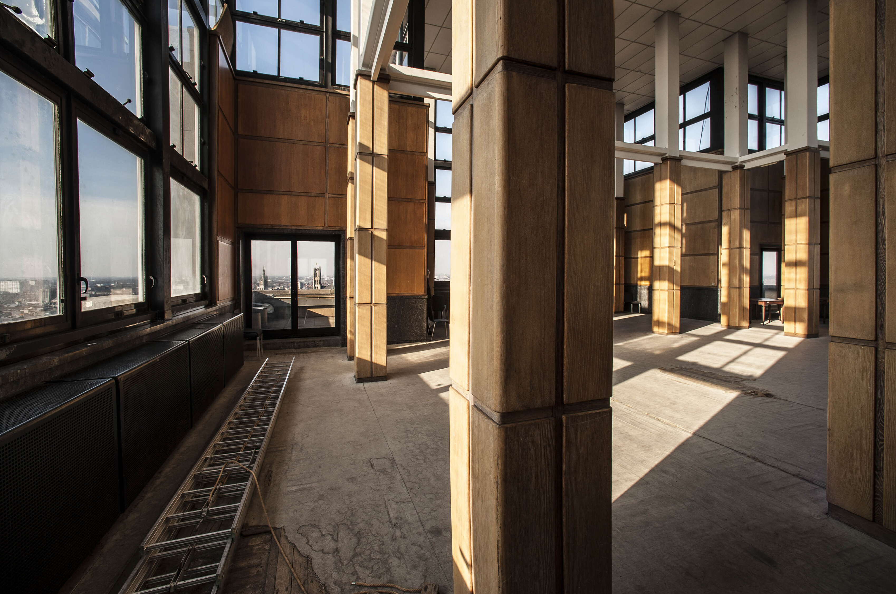 Boekentoren UGent - de belvedère boven de 24-ste verdieping.